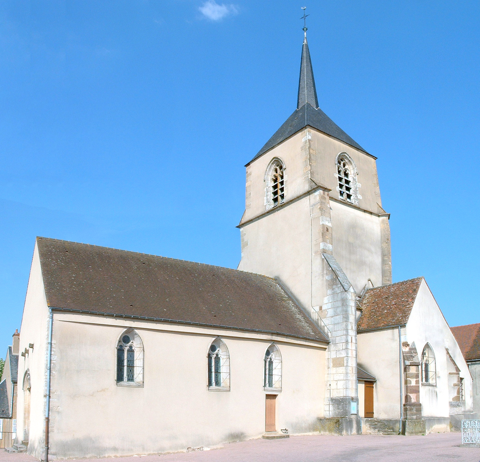 Église de Cussy-les-Forges (Yonne)